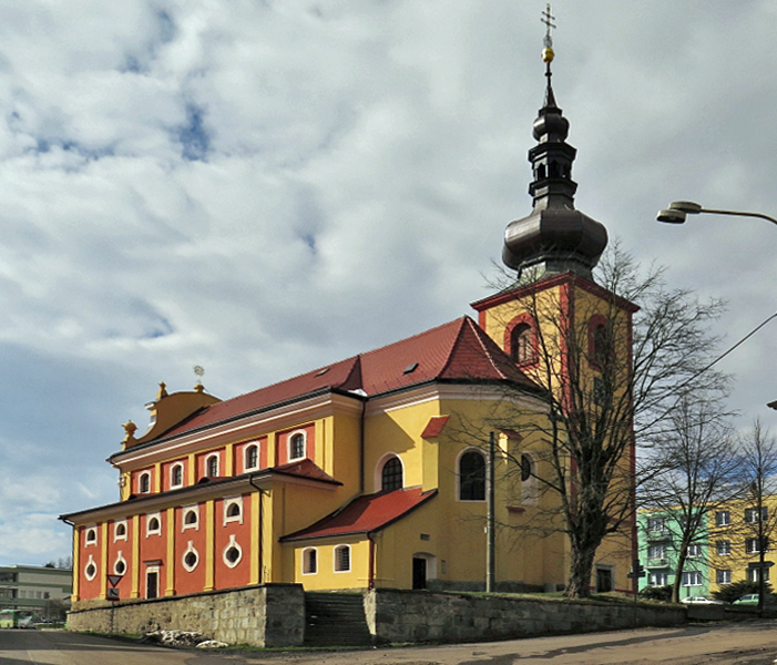 Kostel sv. Anny, náměstí, Verneřice, Verneřice.